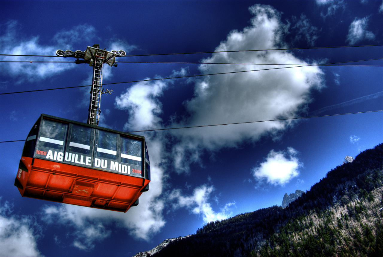 Téléphérique de l'Aiguille du Midi